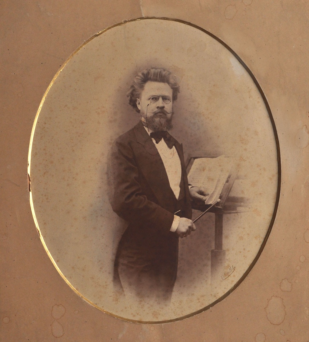 И. И. Слатин — известный русский и украинский музыкально-общественный деятель, пианист и дирижёр, основатель Харьковского отделения ИРМО (1871г.), основатель и директор Харьковского музыкального училища (1883г., преобразованного им в Харьковскую консерваторию ИРМО в 1917году).